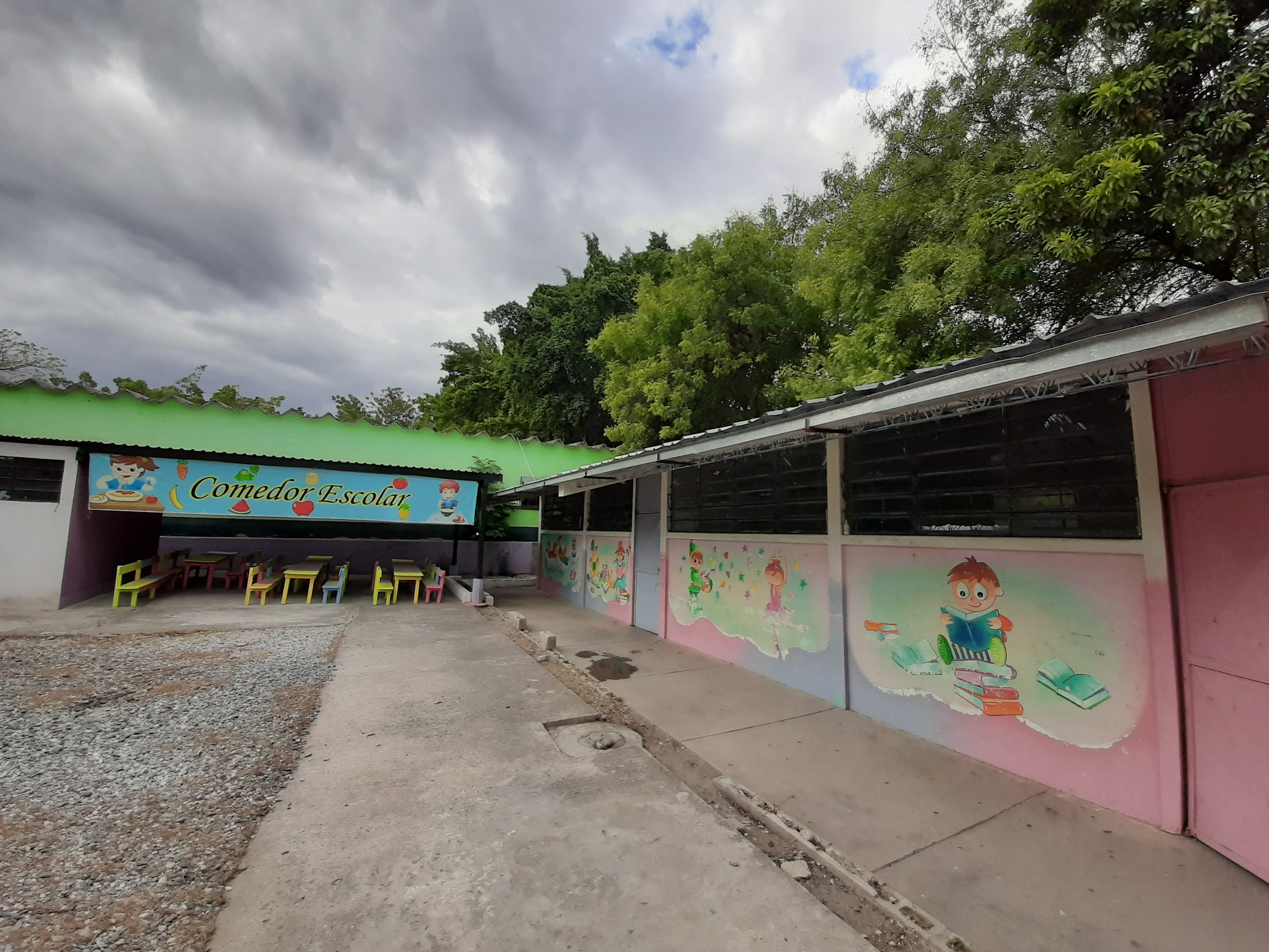 Exterior de escuela